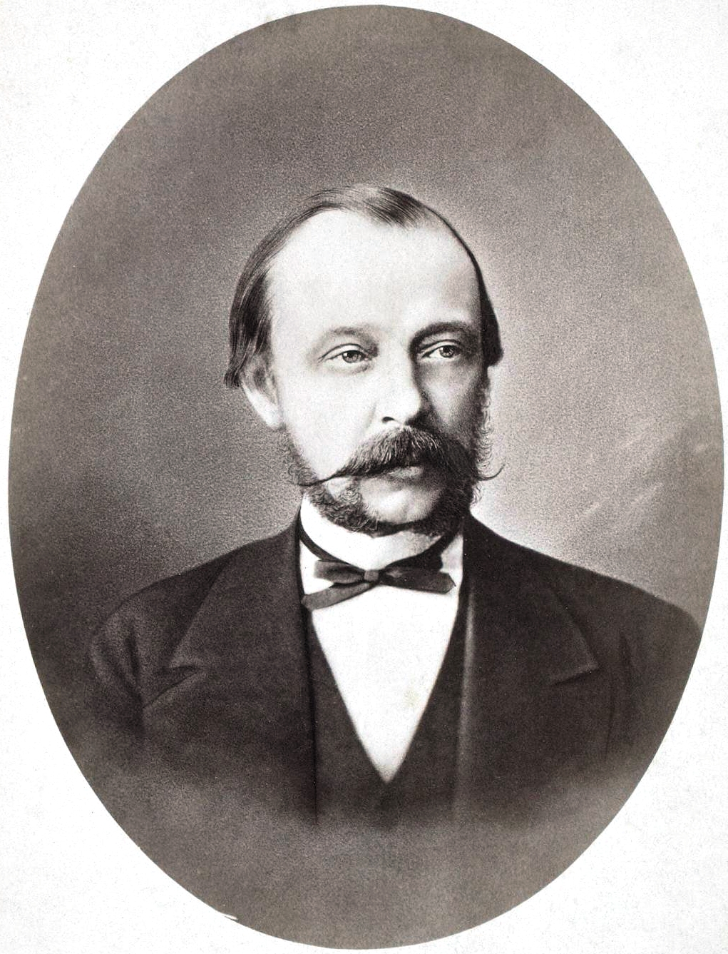 Толстой, Дмитрий Андреевич